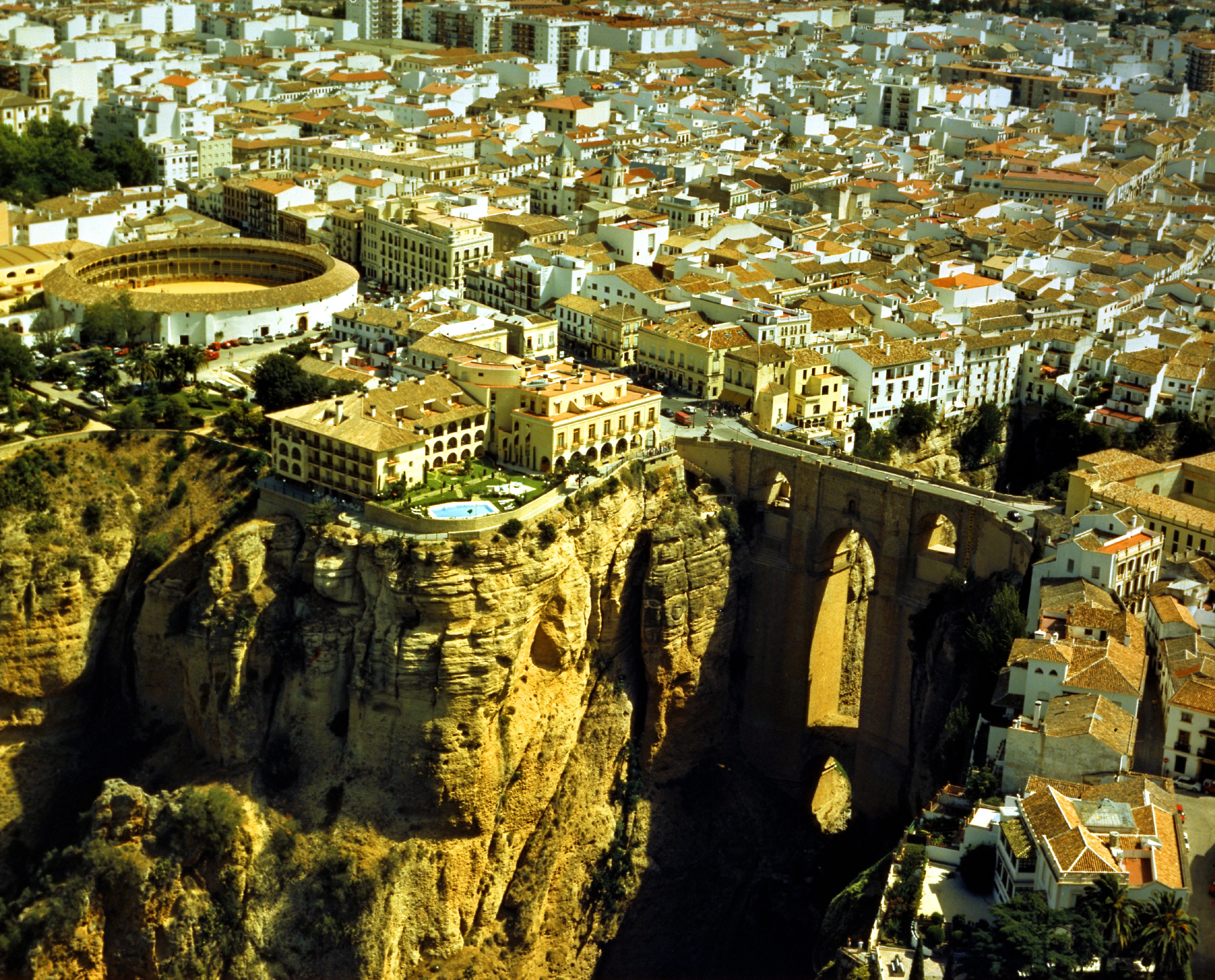 Parador de Ronda vistas